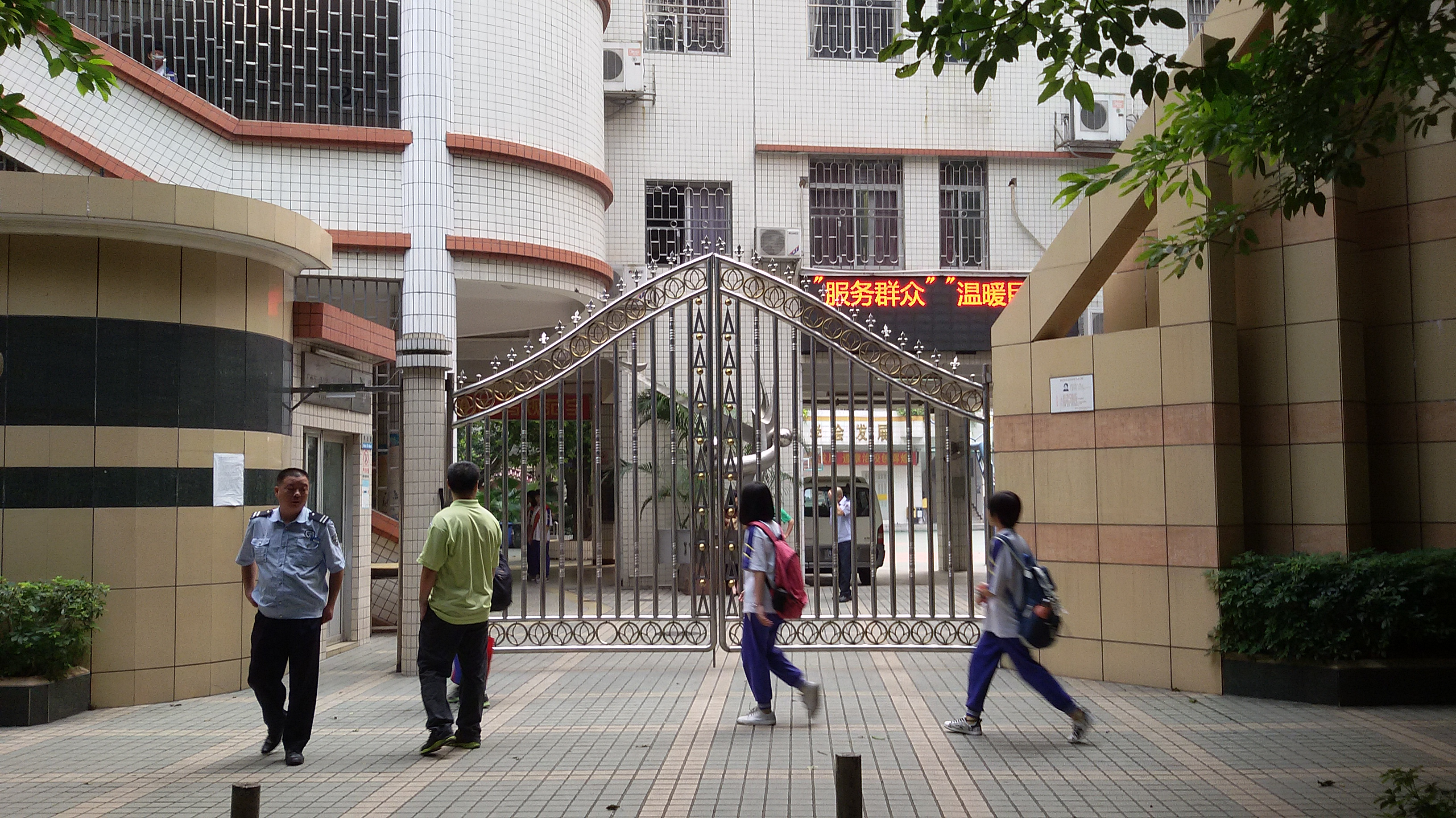 粵語: 廣州市第82中學